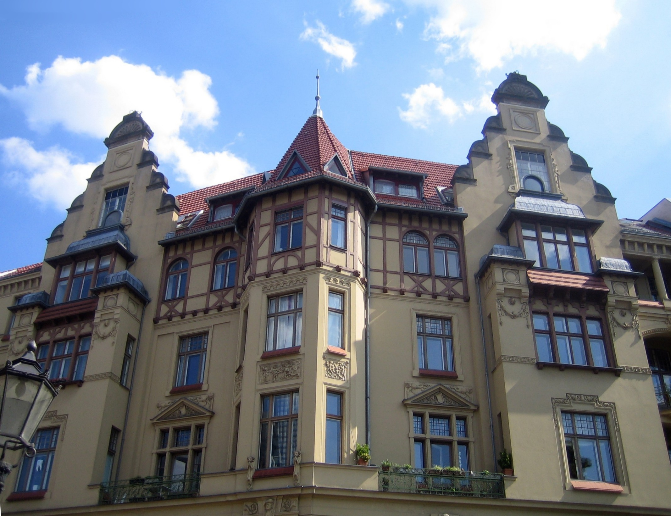 Victoria-Luise-Platz Nr. 7 in Berlin-Schöneberg. Altbau am Rand des Platzes.